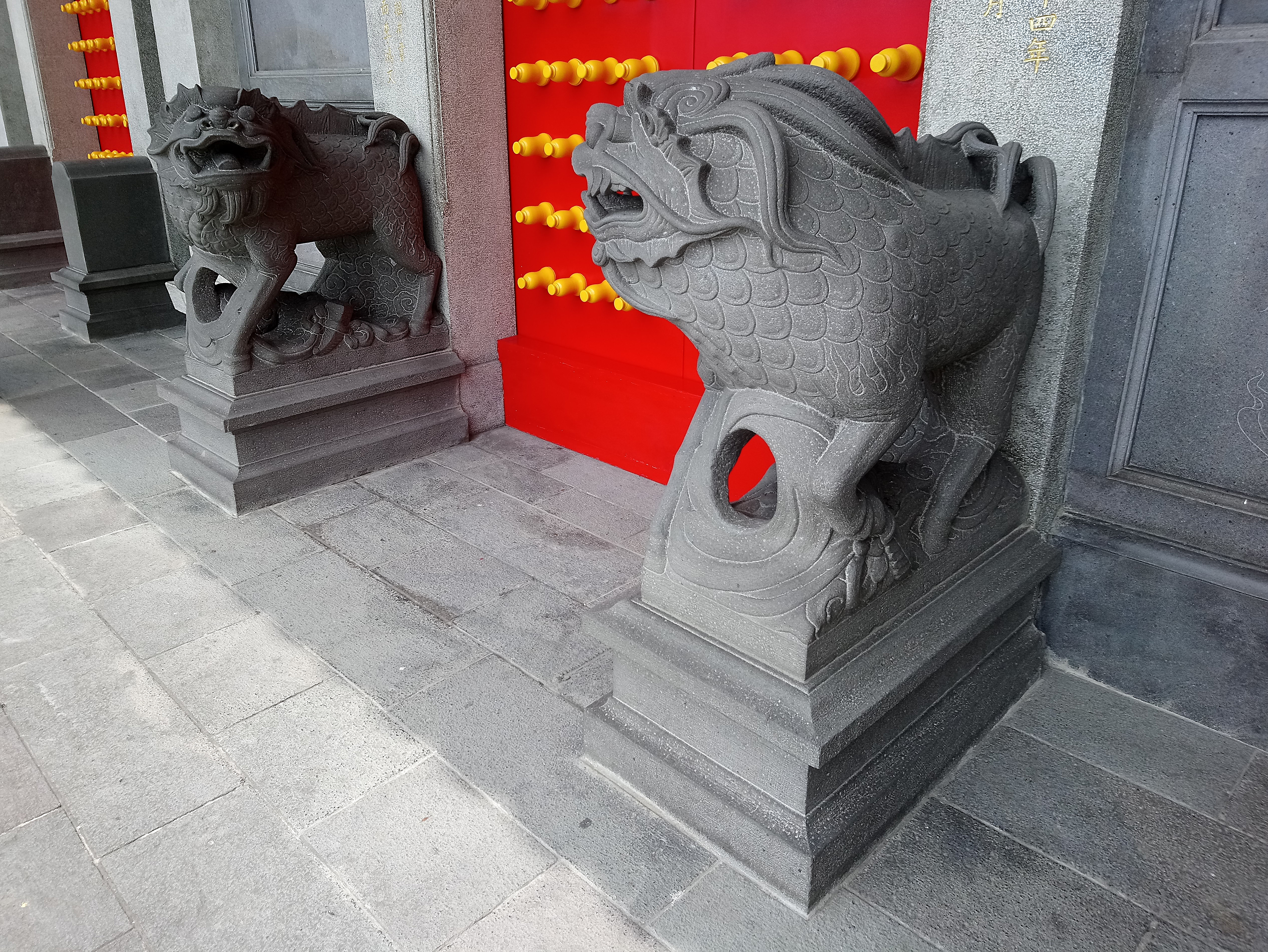 三峽行修宮麒麟鎮門獸,新北市三峽區嘉添里